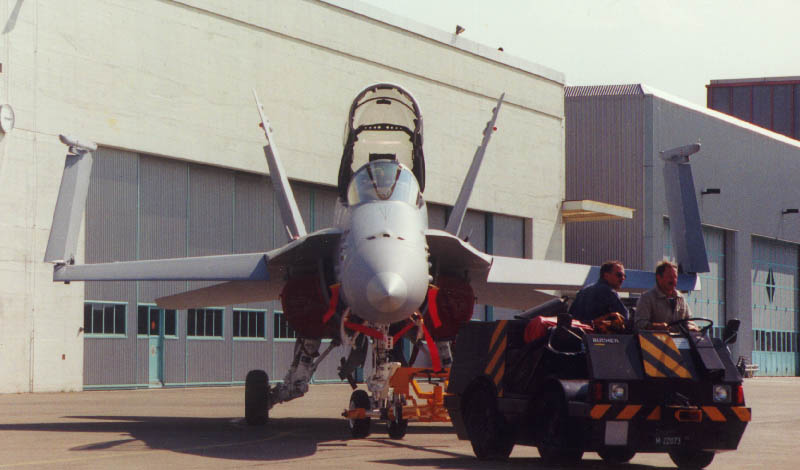 Foto eines Bucher FS 10 Flugzeugschlepper 78 (10 t, L, 4x2) mit einer F/A-18D, 1996, Wo?